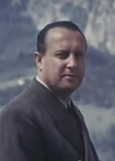 Walter Hewel (1904-1945)